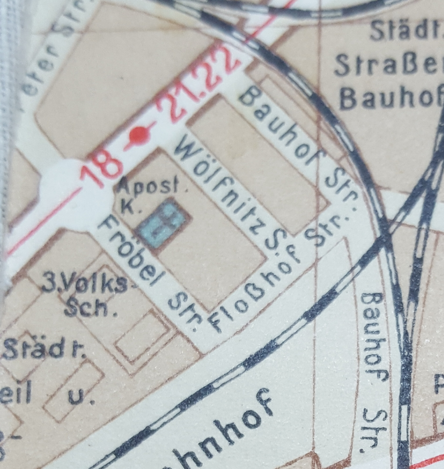 Friedrichstadt, Stadtplan Dresden von 1928. Katholische-apostolische Kirche